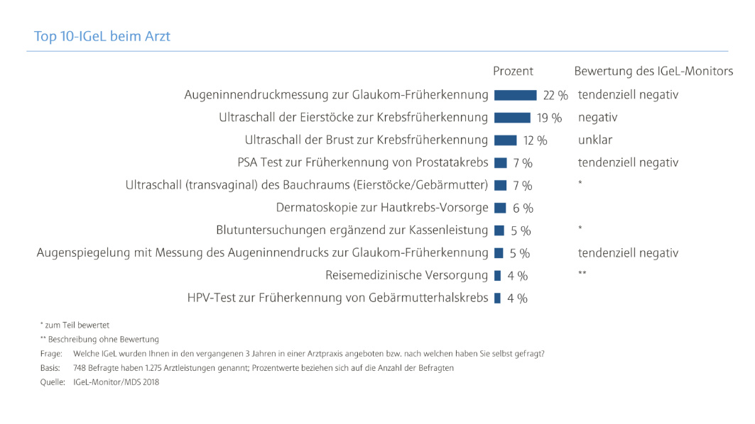 Häufigkeit von angebotenen und nachgefragten Individuellen Gesundheitsleistungen (IGeL) im Jahr 2018 in Deutschland